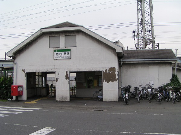 Musashi-Shiraishi Station, JR-East Tsurumi Line, Kawasaki-ku, Kawasaki, Japan